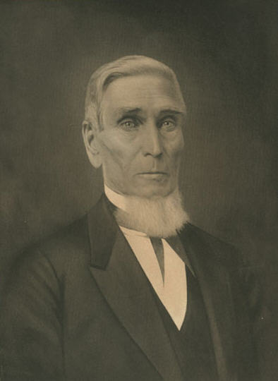 Daniel Pratt (1799-1873)